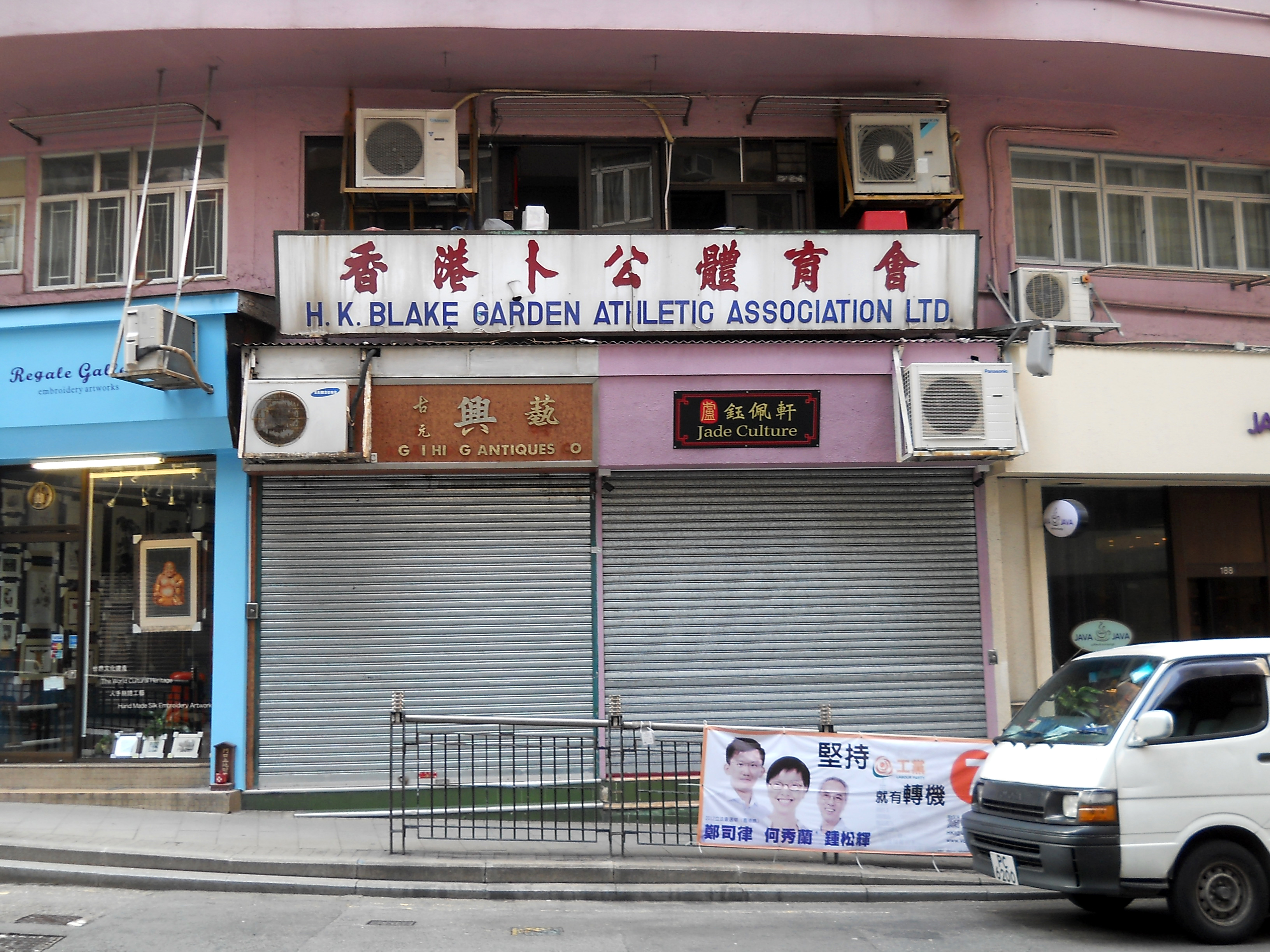 中文（香港）: 香港卜公體育會會址